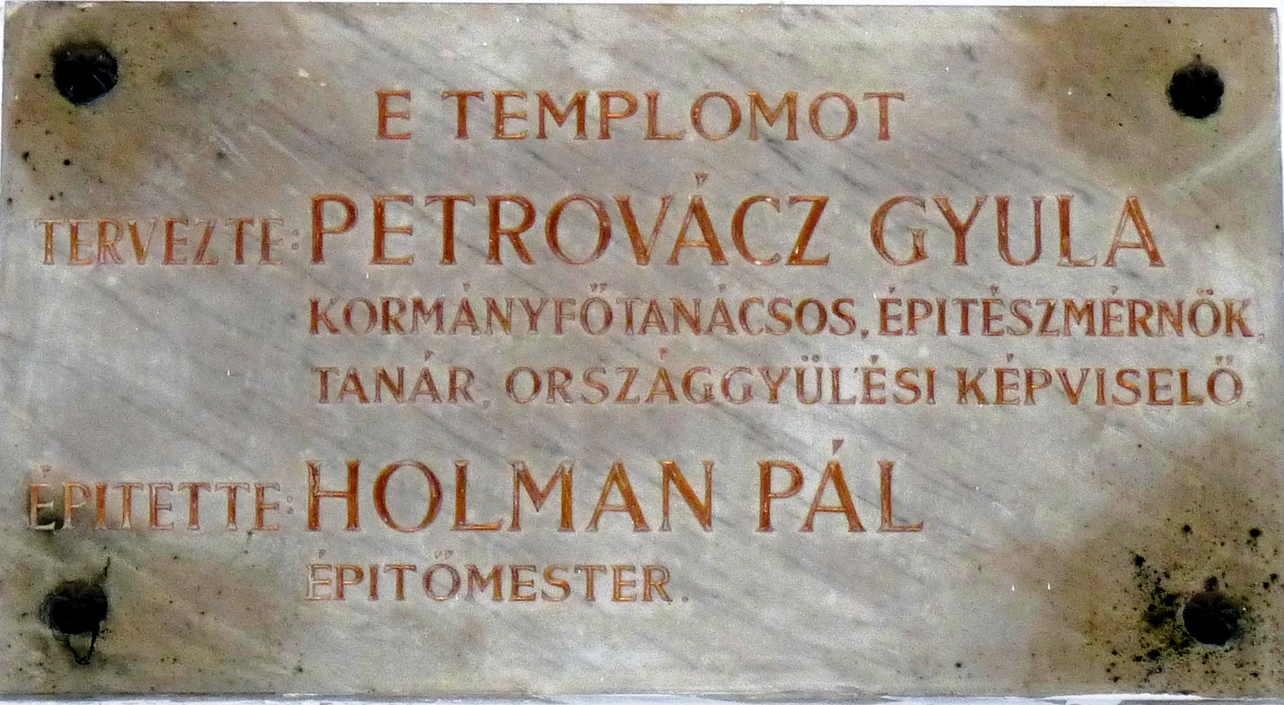 Petrovácz Gyula építészmérnök, egyetemi tanár, országgyűlési képviselő emléktáblája az általa tervezett (angyalföldi) magdolnavárosi Szent László-plébániatemplom előterében. (Budapest, XIII. ker. Béke tér 1/a., Szent László-plébániatemplom)